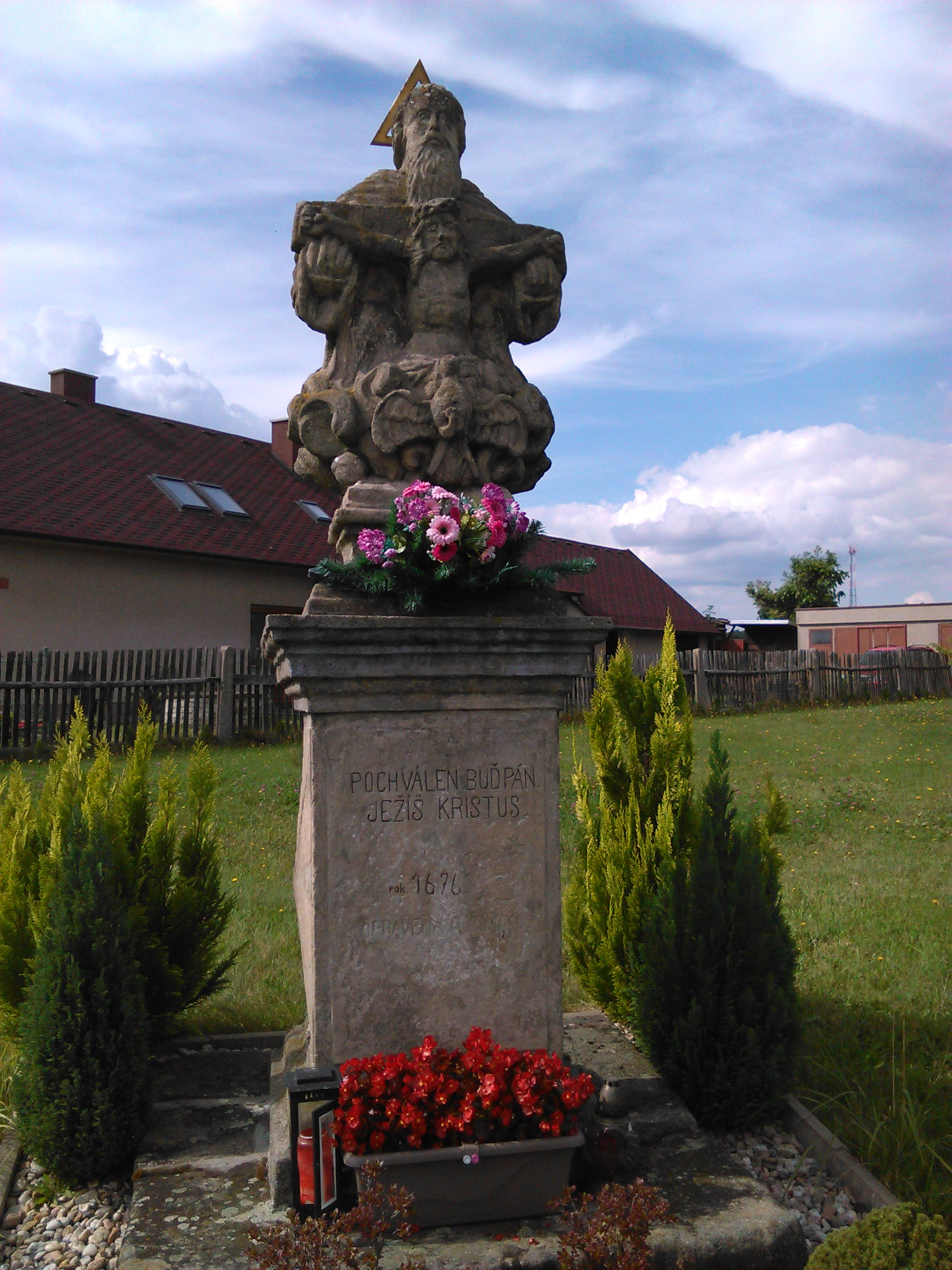 Holín, obec Bojanov; z roku 1676, váže se k ní dávná pověst